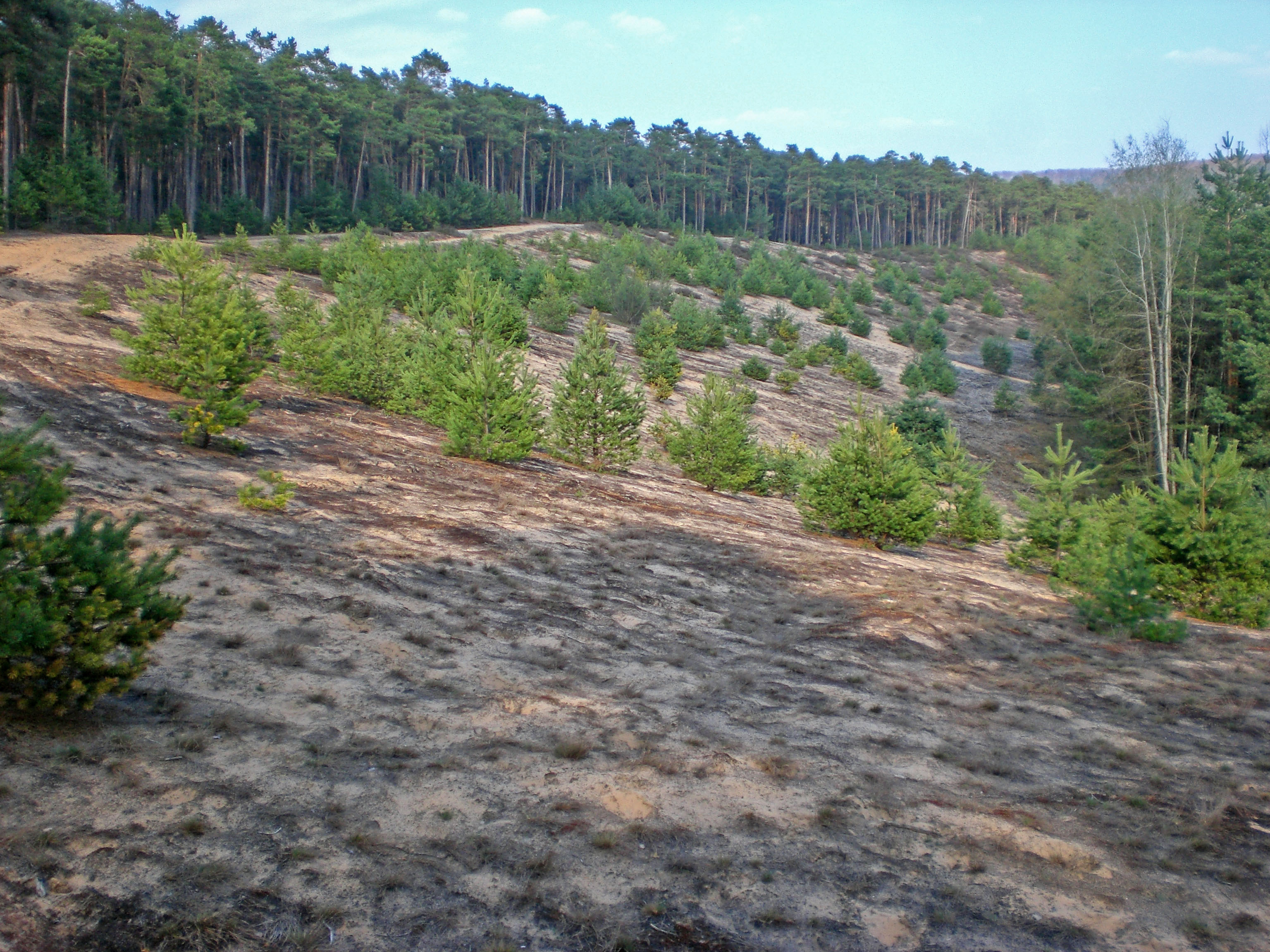 Flechten-Kiefernwälder südlich Leinburg